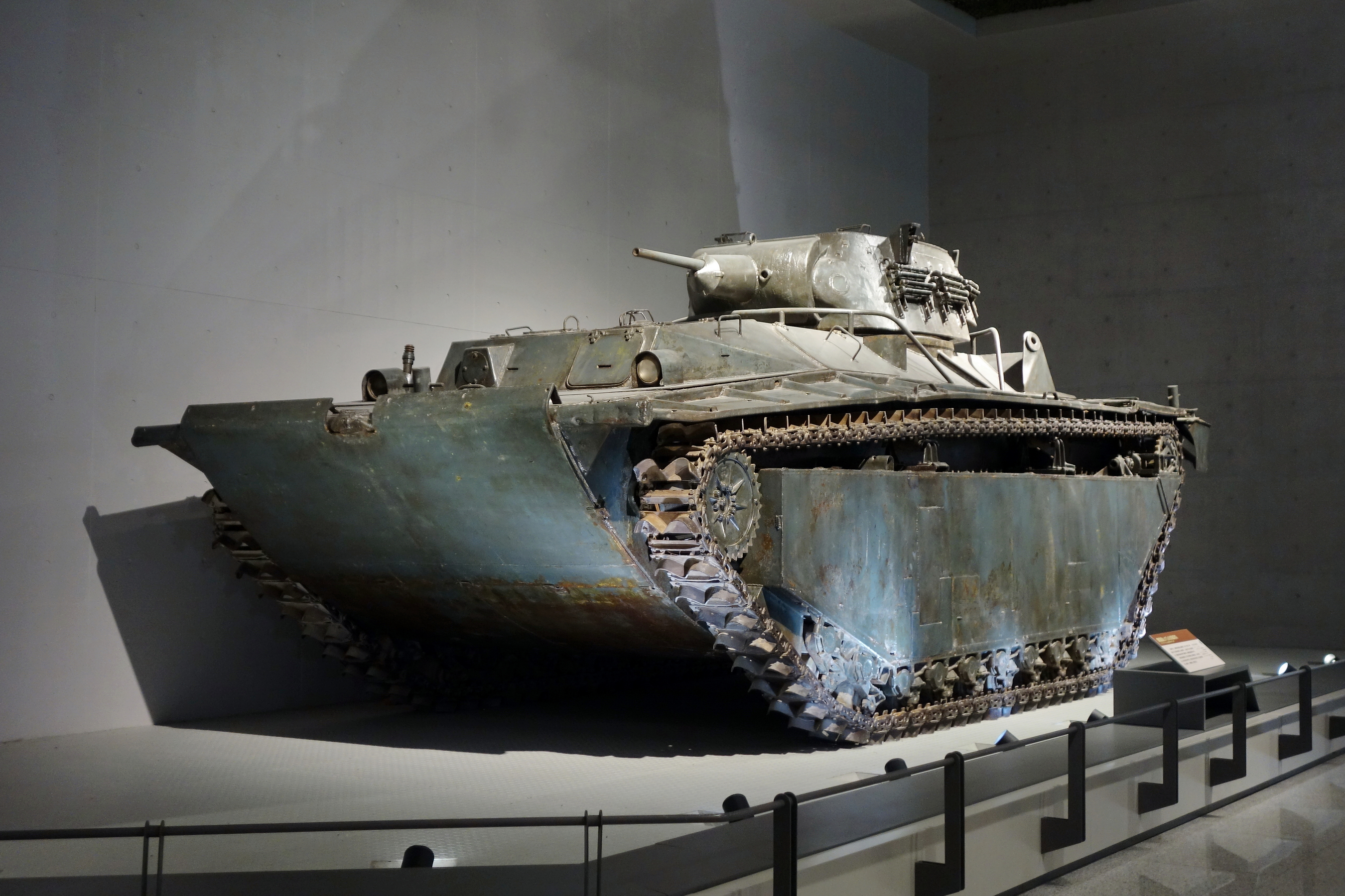 美国造LVT (A)，保存在中国人民革命军事博物馆。